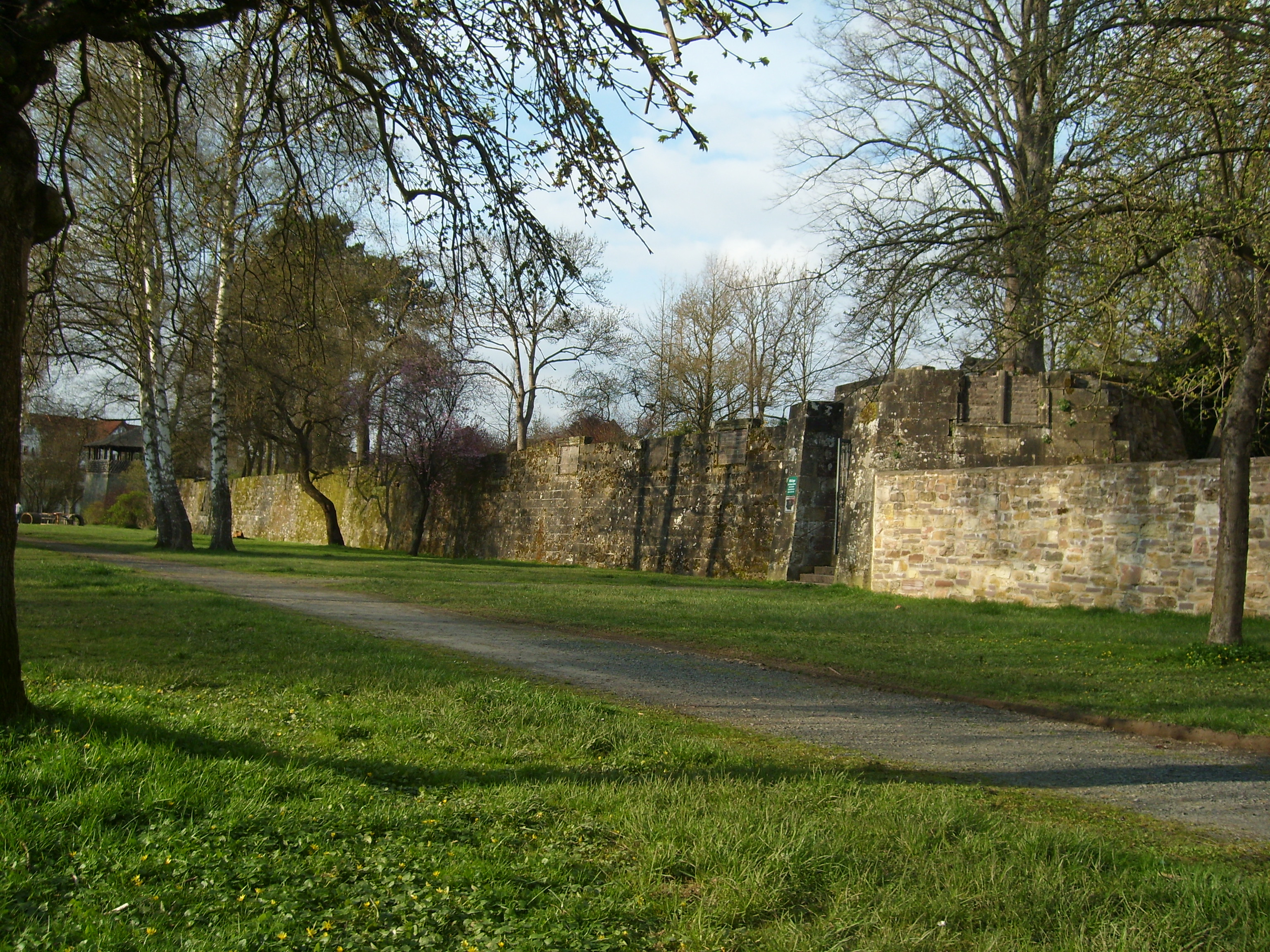 Reste der Grundmauern von Schloß Freudenthal in Uslar.